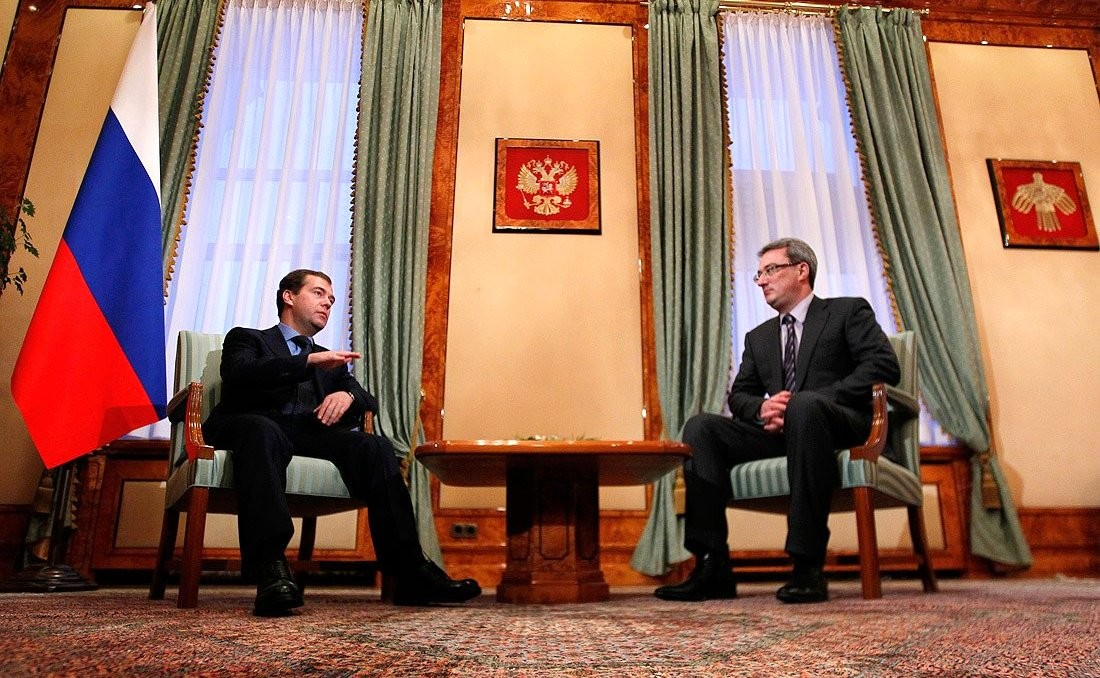 С Главой Республики Коми Вячеславом Гайзером.